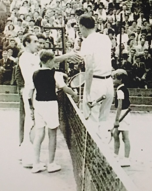 de gauche à droite, Henri Cochet, Serge Rigault, Yvon Petra et Bertrand Rigault disputant une partie - Roland-Garros août 1944